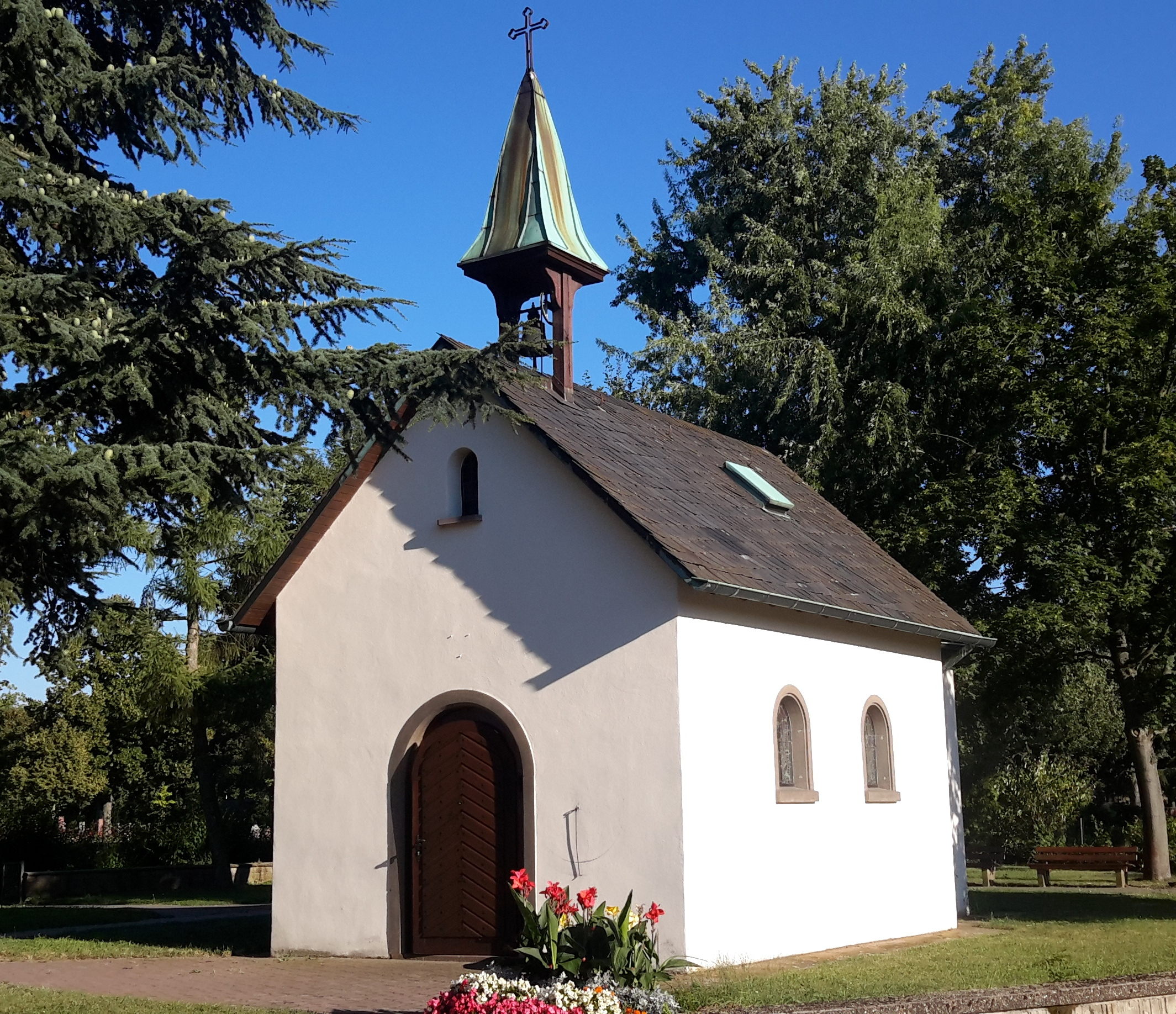 Kriegerkapelle in der Gemeinde Brühl (Baden)